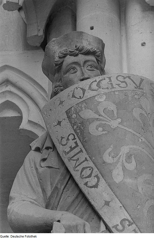 Original image description from the Deutsche FotothekStifterfigur Graf Dietmar im Naumburger Dom St. Peter und Paul